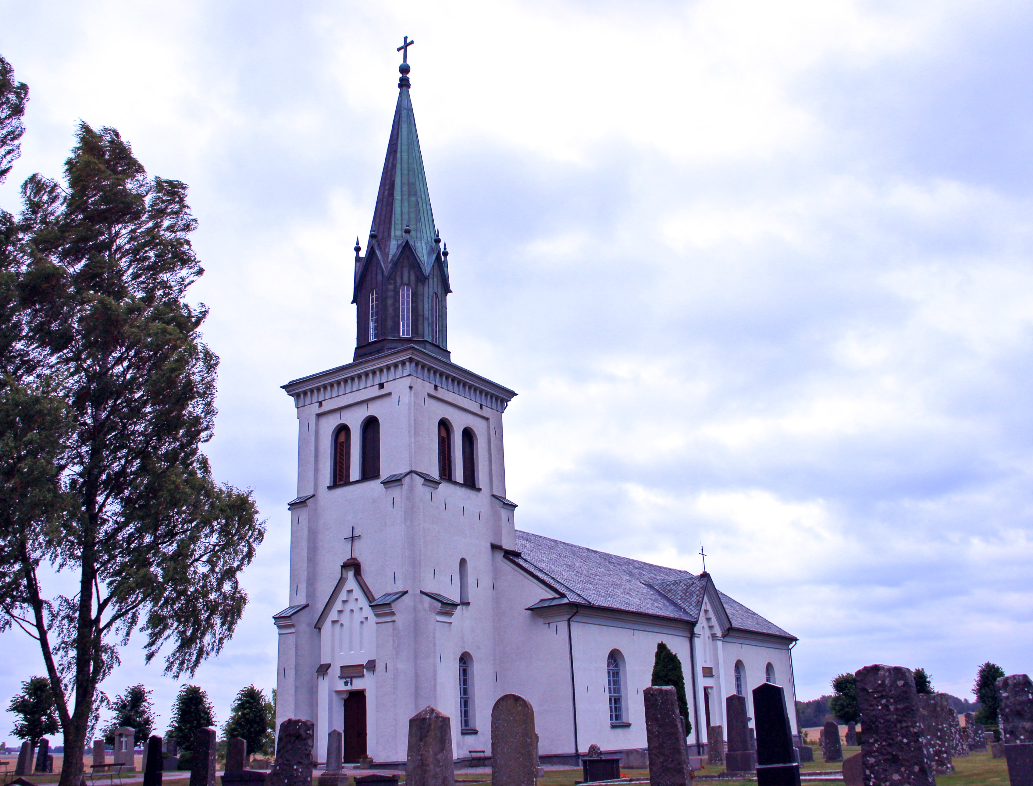 Skarstads kyrka (Skarstad 13:1)